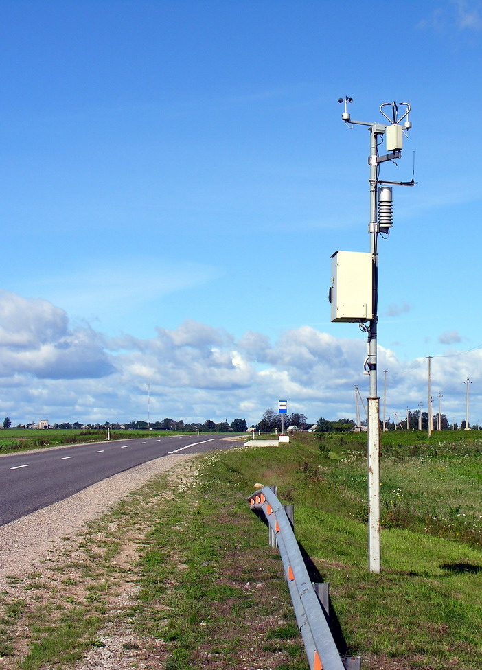 Meteorologija Foto: Algirdas, 2006 m. rugsėjo 9 d., Lietuva